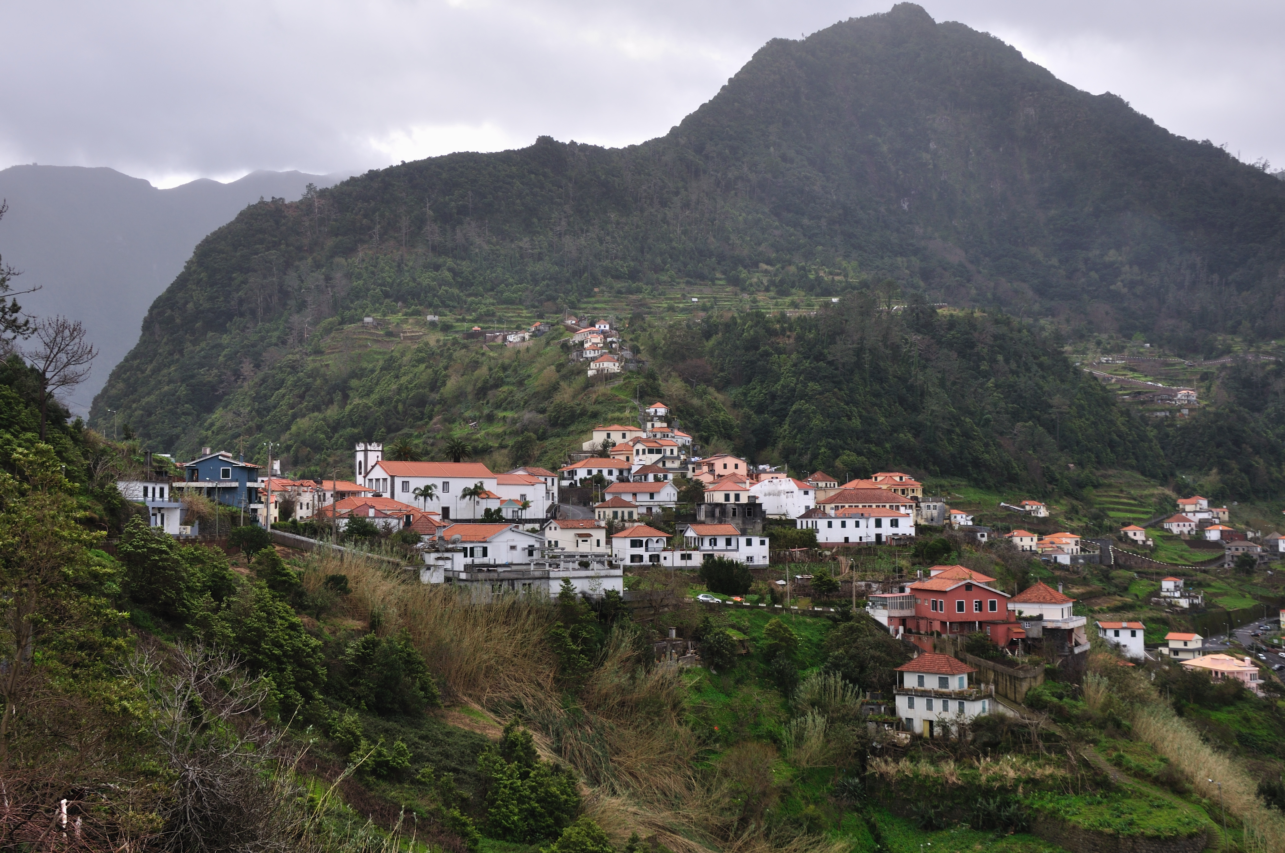 Portugal, Madeira, Boaventura